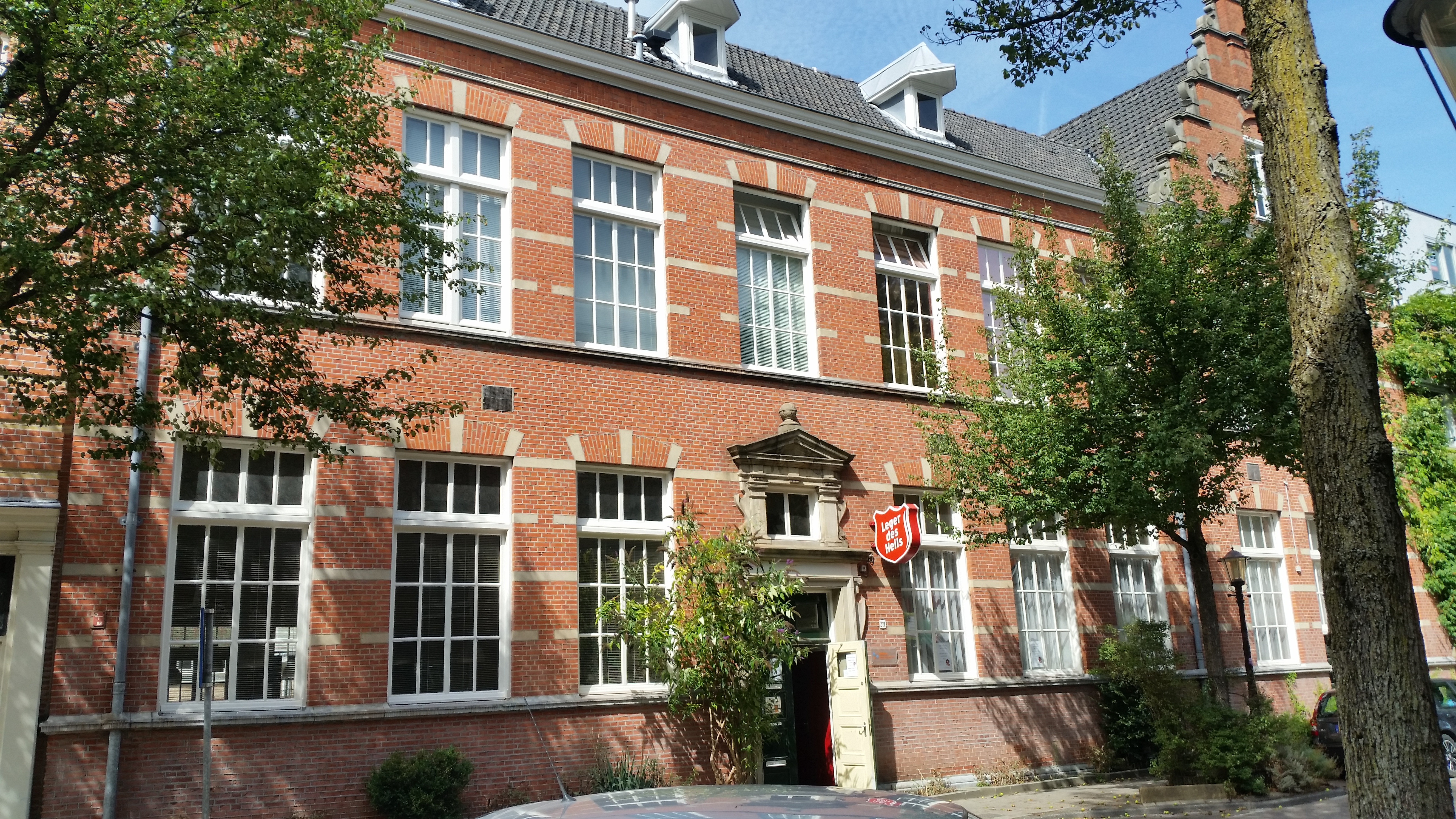 Derde Oosterparkstraat, Amsterdam, nrs 271, voormalige school, later Leger des heils